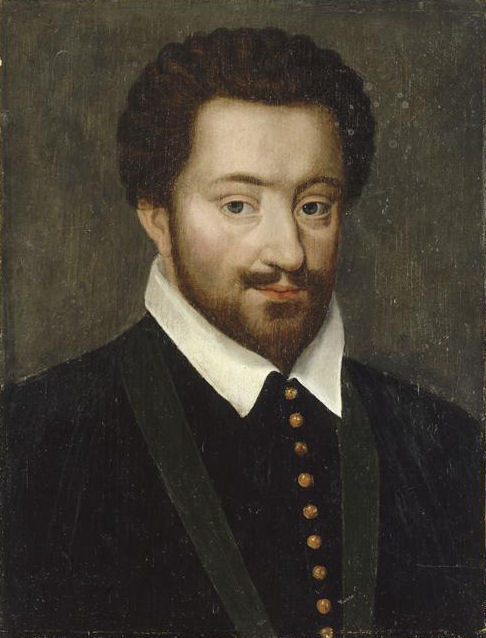 Portrait de Charles, duc de Mayenne (1554-1611)